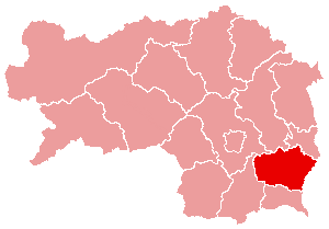 Karte: politischer Bezirk Feldbach Lizenz: GFDL Quelle: Zeichnung plp Datum: de:2004 Ort: Wien